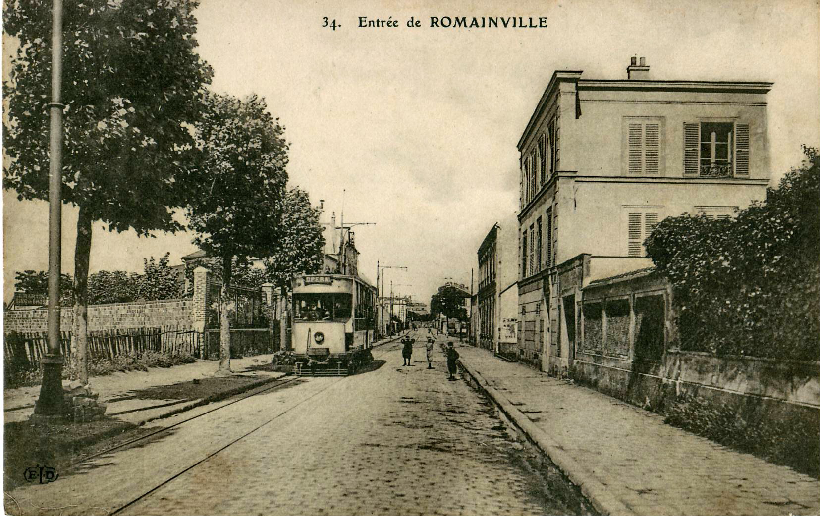 Carte postale ancienne éditée par ELD, n°34 : Entrée de Romainville Vue d'un tramway de la Compagnie des tramways de l'Est parisien